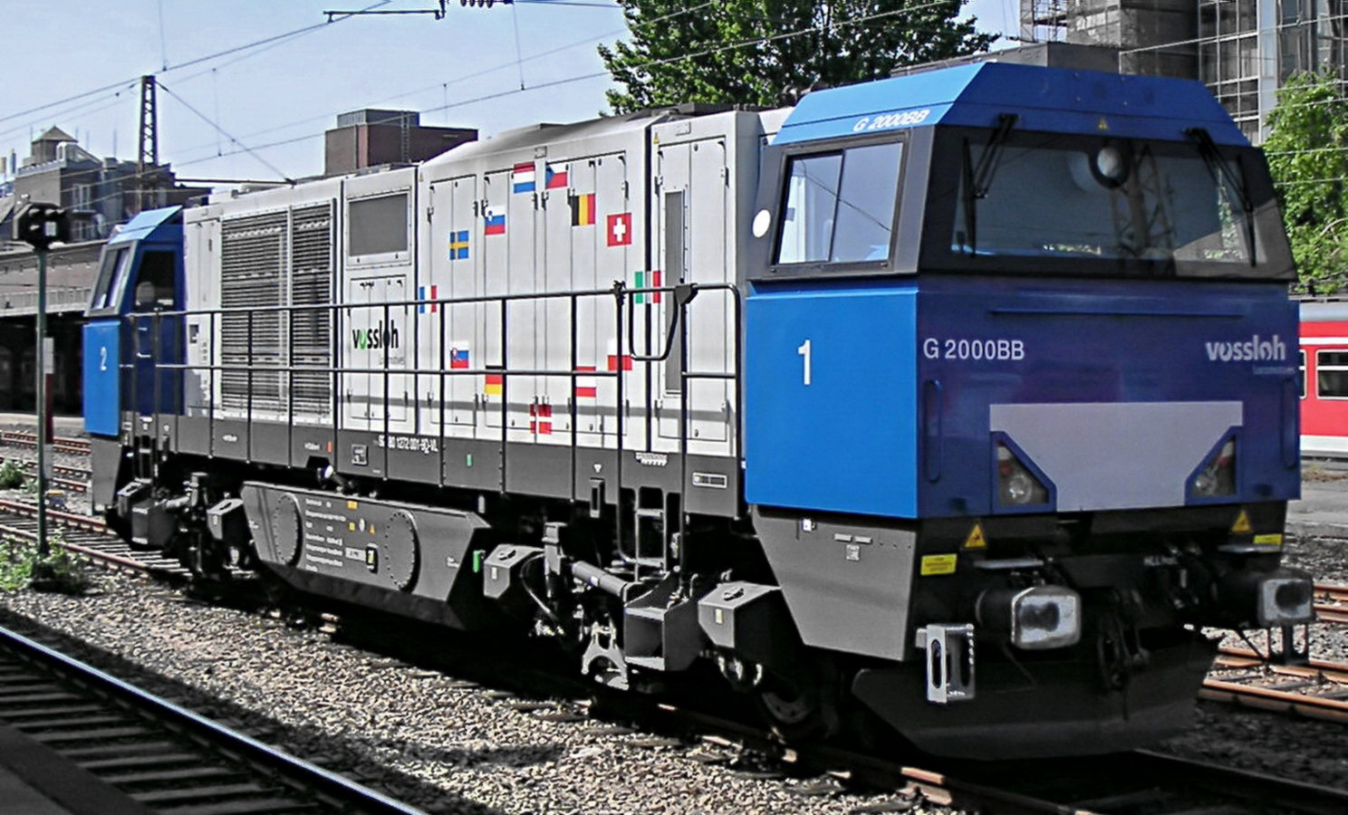 Vossloh G 2000 BB Vorführlok auf Gleis 23 des Essener Hauptbahnhofes